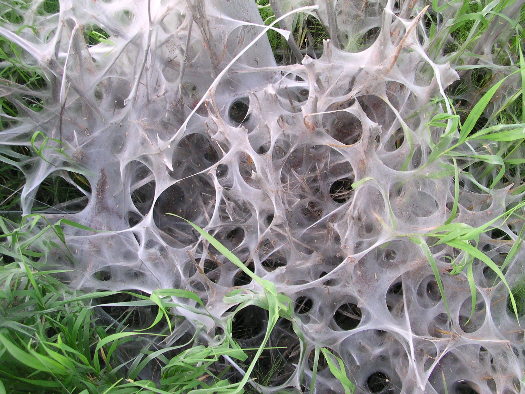 Yponomeuta evonymella